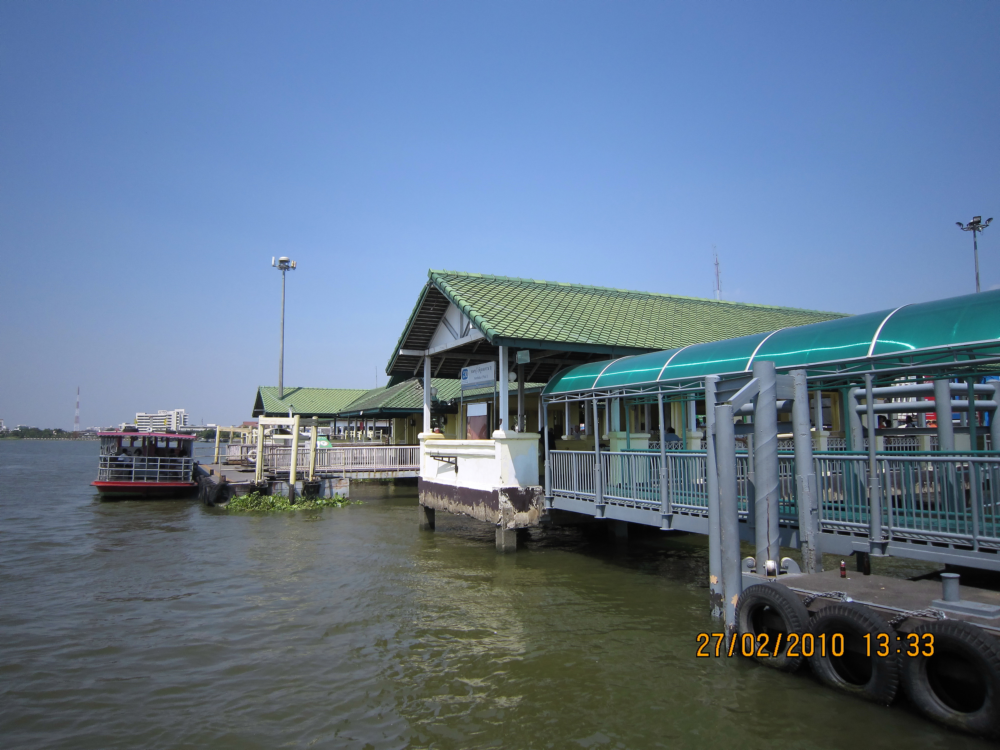 ท่าน้ำนนทบุรี